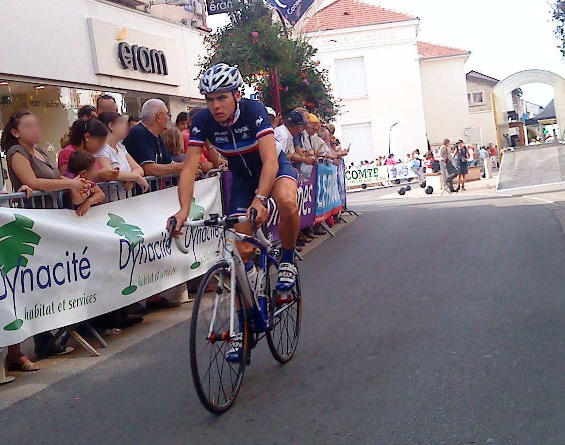 Arnaud Courteille avant le prologue du Tour de l'Ain 2010